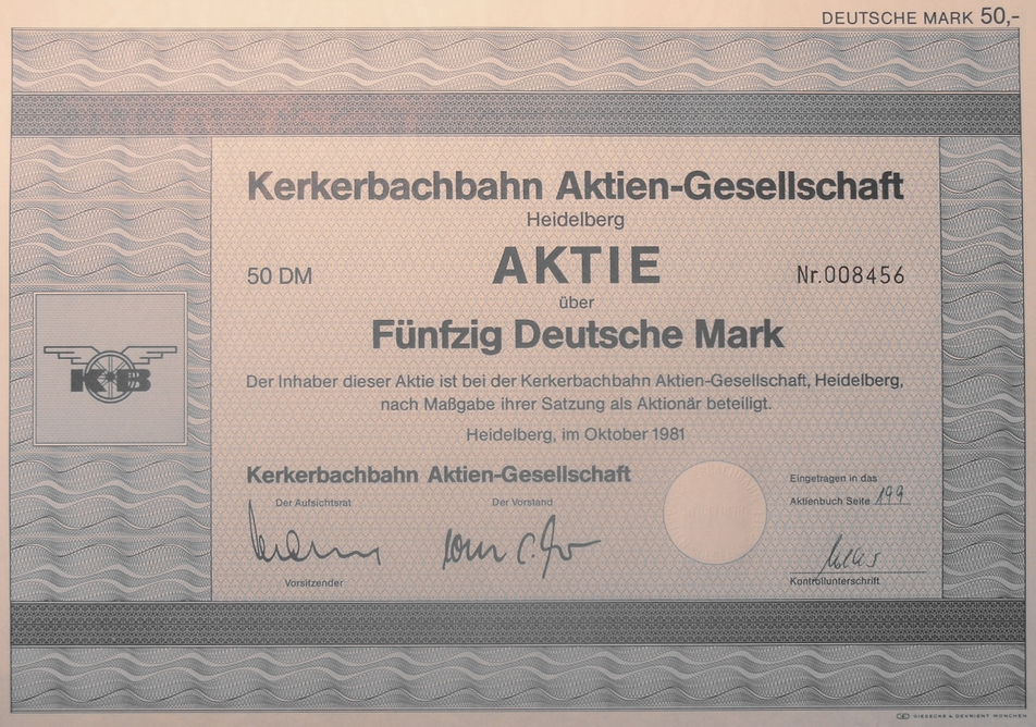 Aktie der Kerkerbachbahn von 1981 aus der Immobilienzeit. Eigenes Foto von eigener Urkunde. Hans Schlieper, 31. Mai 2006